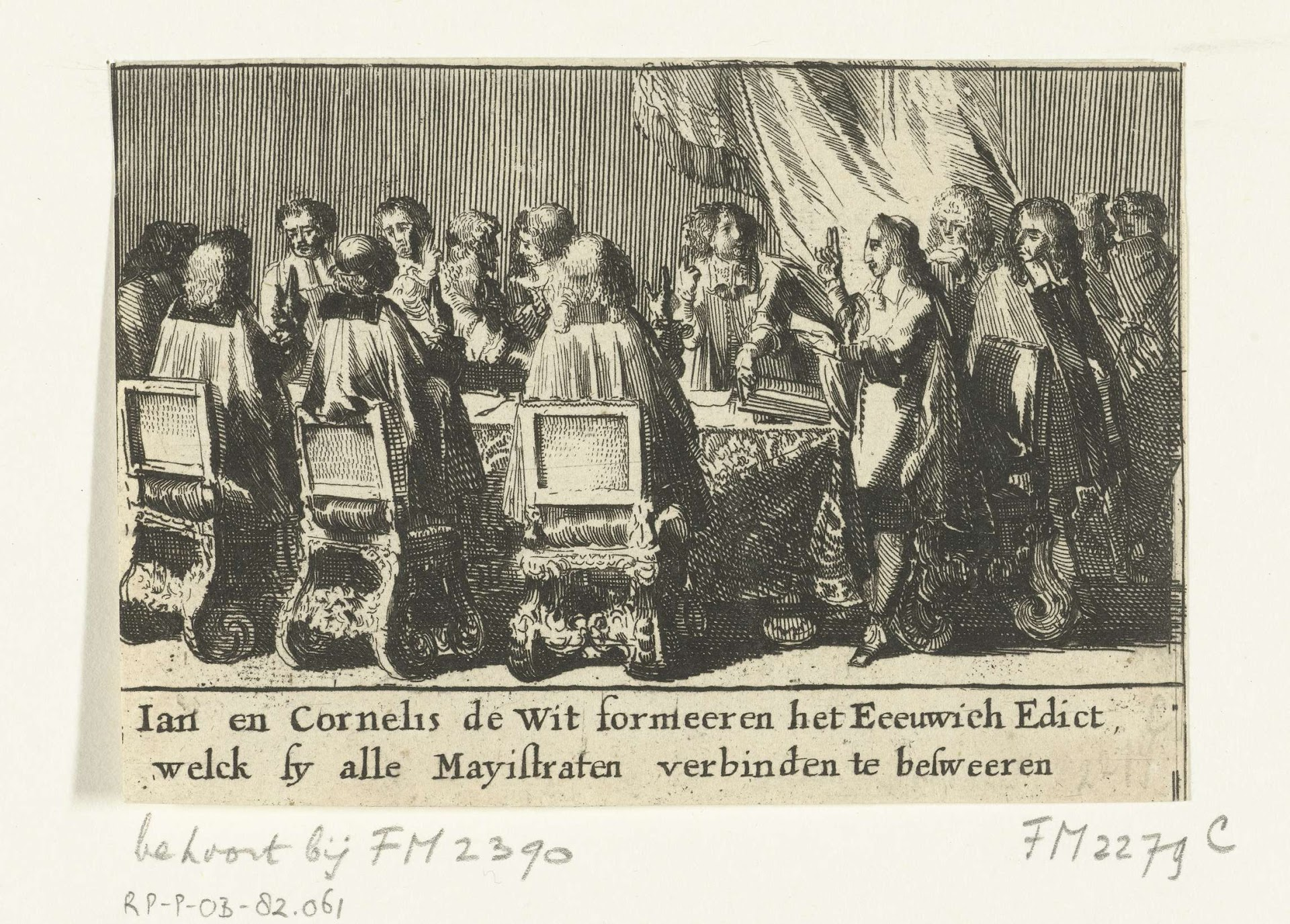 De Staten van Holland nemen onder leiding van Johan en Cornelis de Witt het Eeuwig Edict (1667) aan. Dit bepaalde dat het stadhouderschap in Holland werd afgeschaft en alle politieke functies van de stadhouder werden overgedragen op de Staten van Holland. Tevens werden de zes andere gewesten van de Republiek der Zeven Verenigde Nederlanden verzocht om het stadhouderschap onverenigbaar te verklaren met het kapitein-generaalschap. Deze maatregel was vooral bedoeld om de macht en ambities van het huis Oranje-Nassau en het verwante Engelse koningshuis Stuart aan banden te leggen.